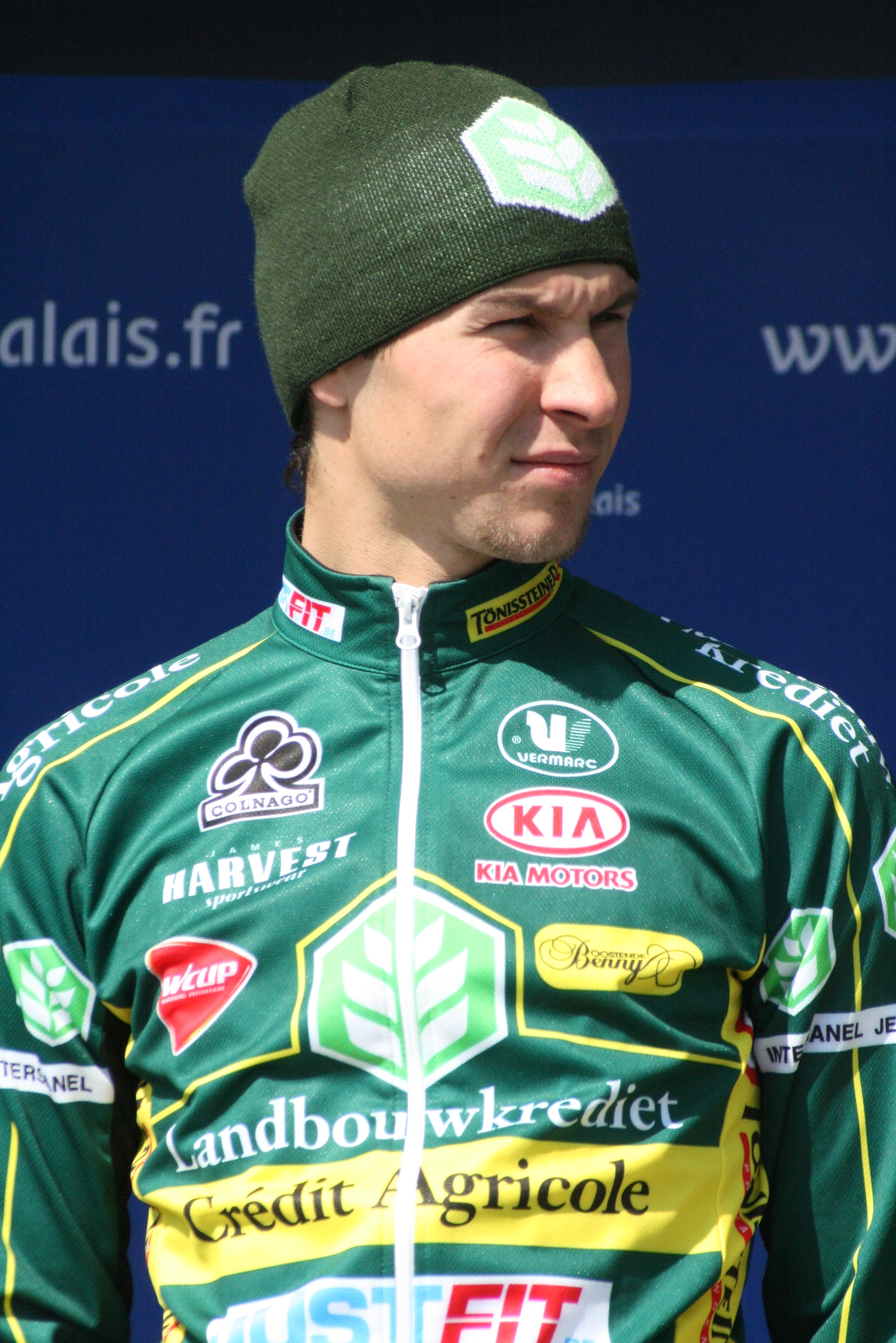 Présentation des coureurs au départ de la première étape Aidis Kruopis